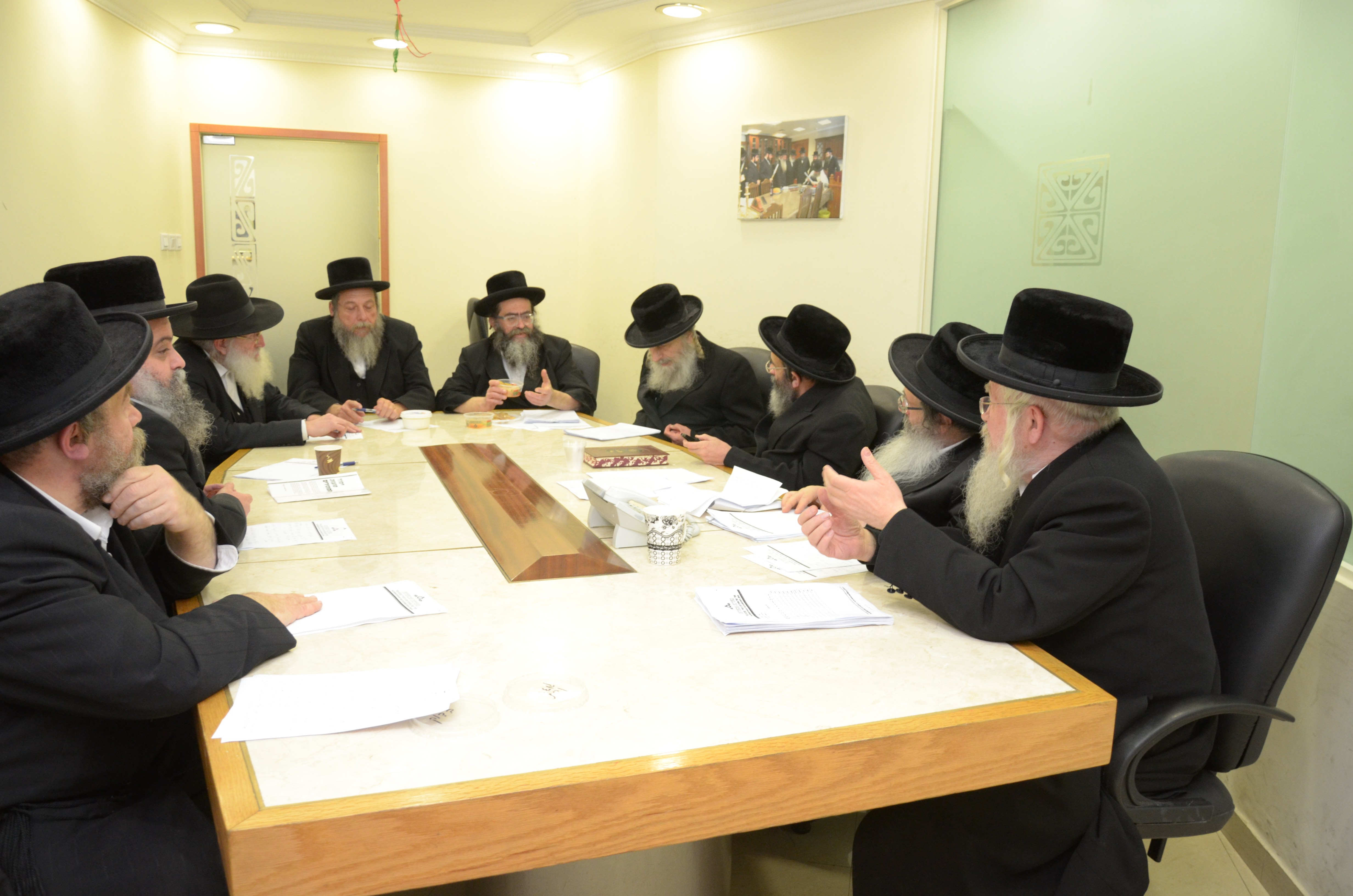 ישיבת בית דין שבועי במערכת הכשרות